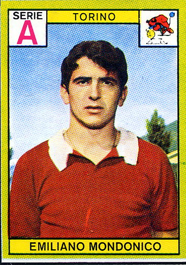 Emiliano Mondonico che indossa la maglia del Torino